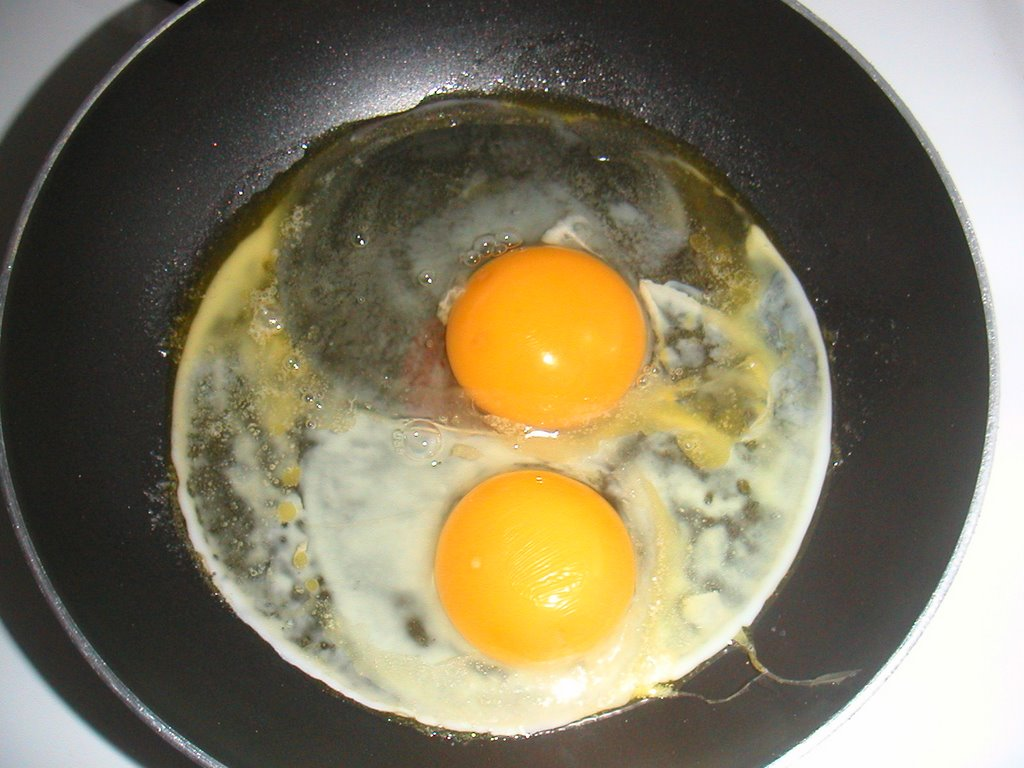 Spejlæg